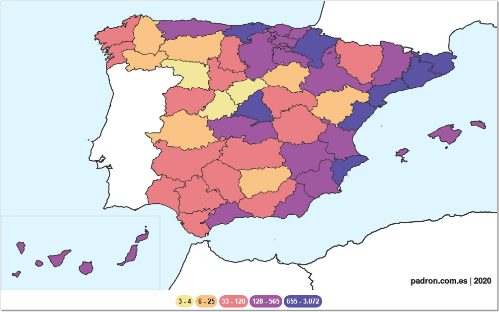 Datos provinciales de población moldava residente en España.